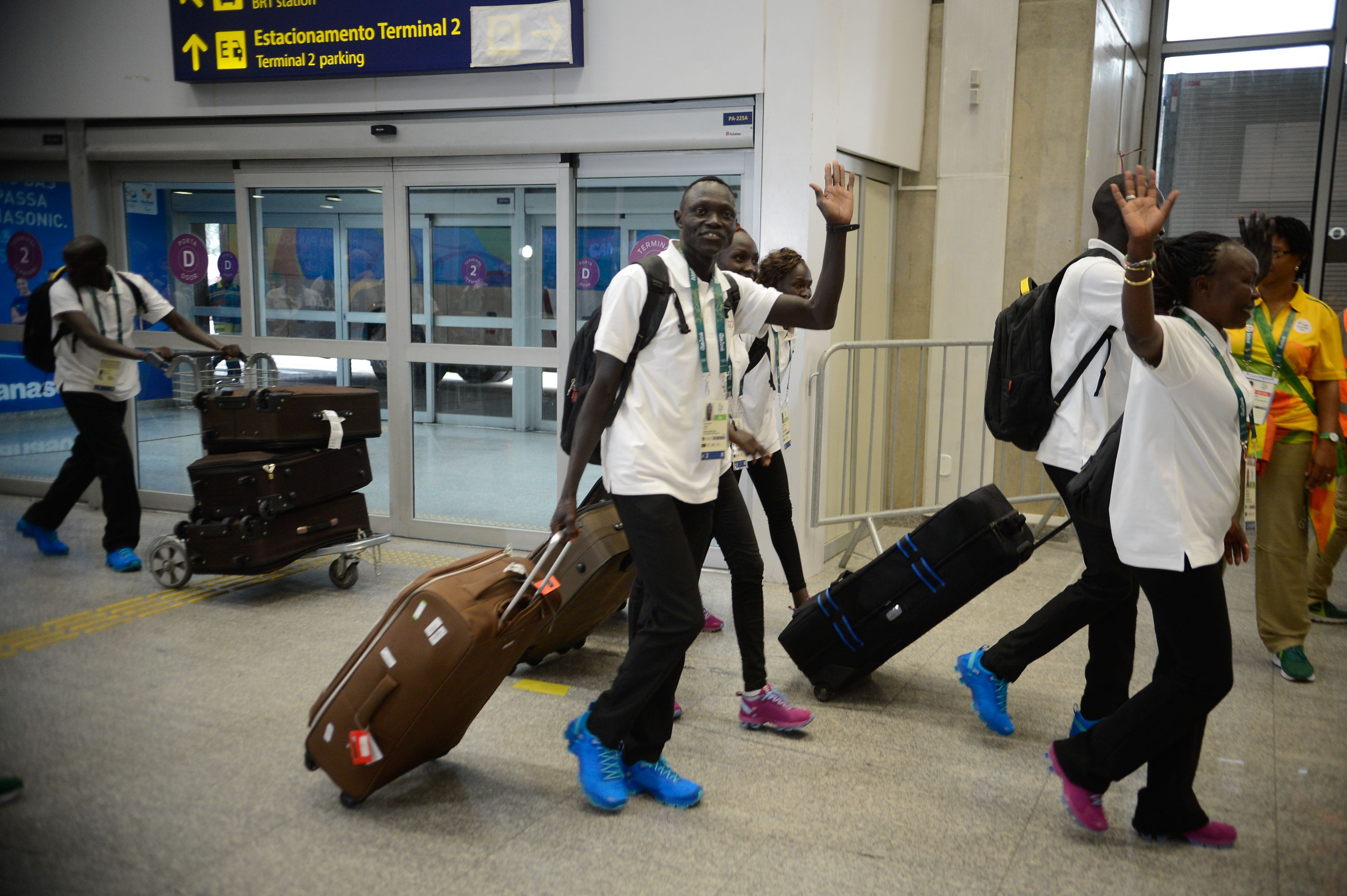 Rio de Janeiro - Integrantes da Equipe OlГ­mpica de Atletas Refugiados desembarcam no RioGaleГЈo. Os atletas sГЈo refugiados do SudГЈo do Sul que vivem no QuГЄnia e disputarГЈo diferentes modalidades de corrida nas competiГ§Гµes de atletismo (Foto: Tomaz Silva/AgГЄncia Brasil)